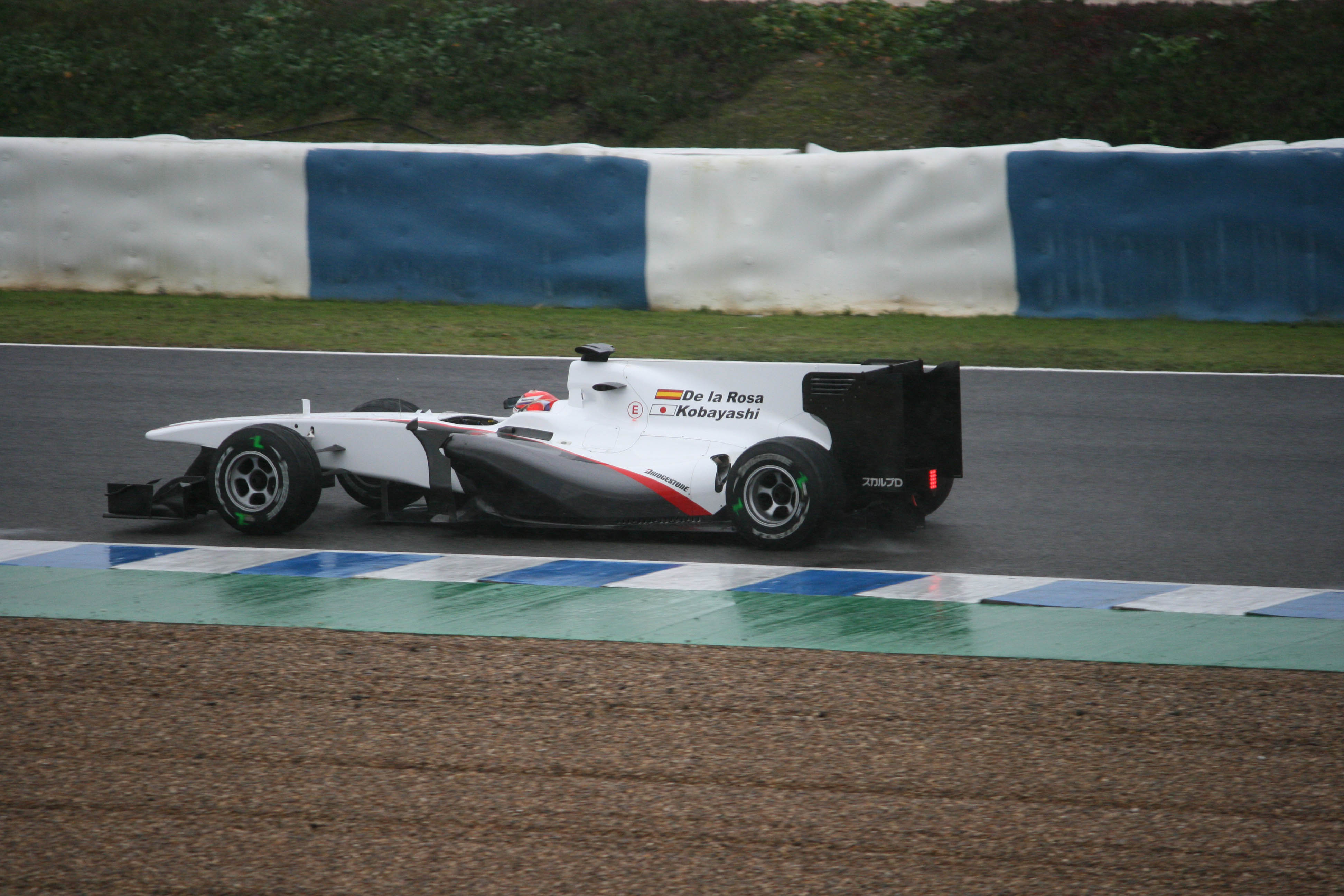 Kamui Kobayashi testing for Sauber at Jerez, 10/02/2010.